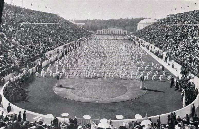 Jeux Olympiques intercalaires de 1906, écoles grecques de gymnastiques avant les récompenses